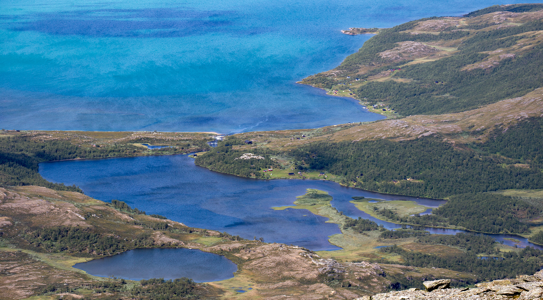 Luoppal, Virihaure och Stáloluokta sameläger. Vy från sluttningen upp mot Gierggevárre.